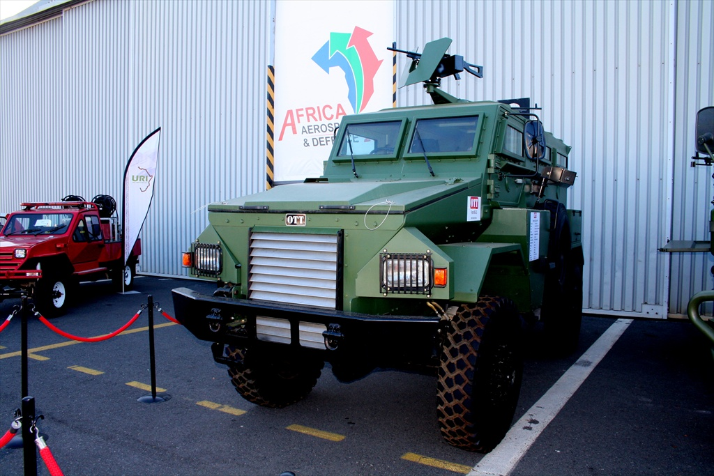 OTT Puma M26-15 MRAP